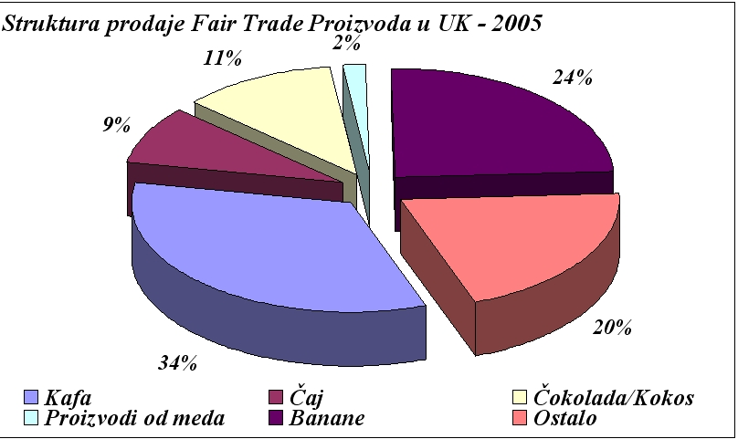 Grafik:Struktura prodaje Fairtrade proizvoda u Ujedinjenom Kraljevstvu 2005graf.jpg